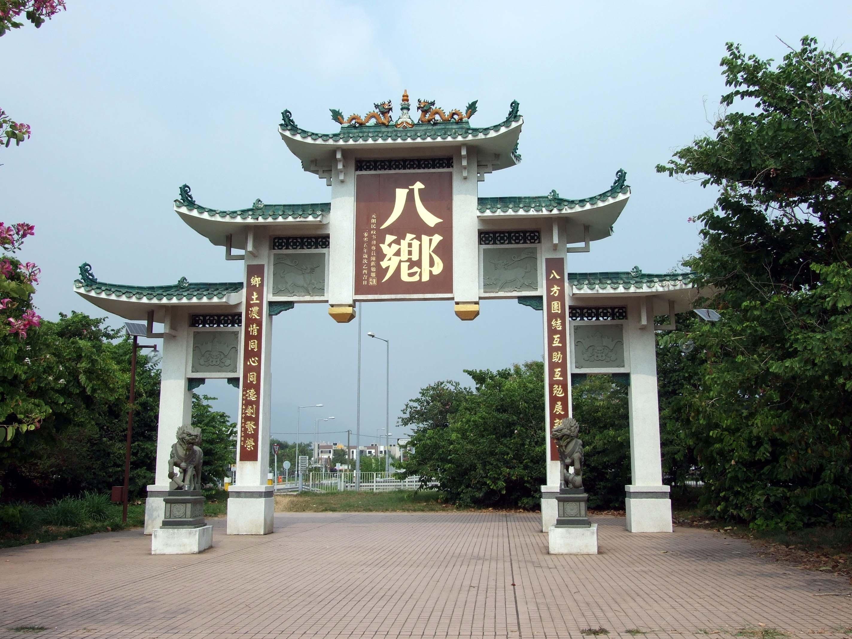 中文（香港）: 八鄉牌樓